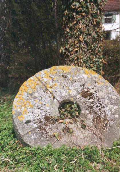 Alter Mühlstein der Getreidemühle Spindelwag bei Rot a. d. Rot